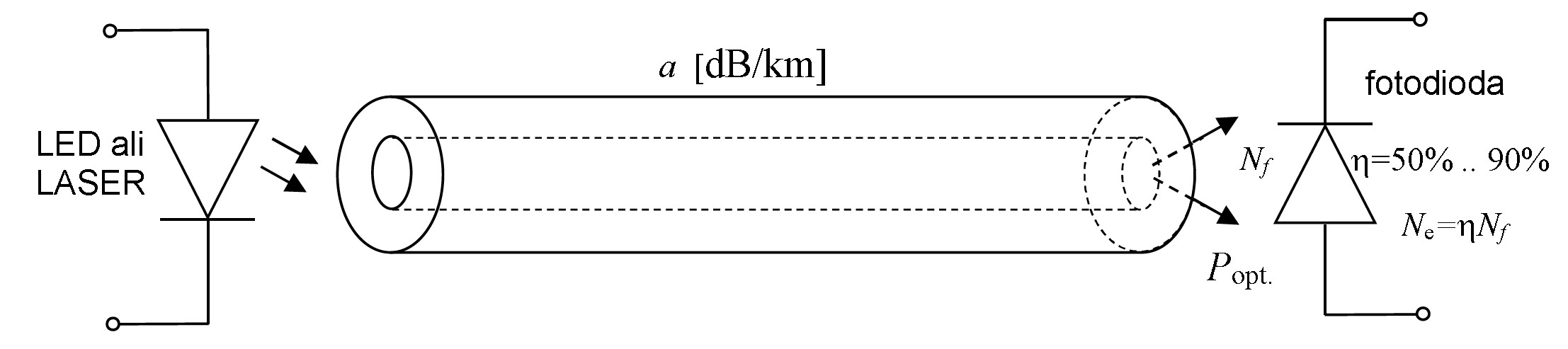 Zveza po optičnem vlaknu